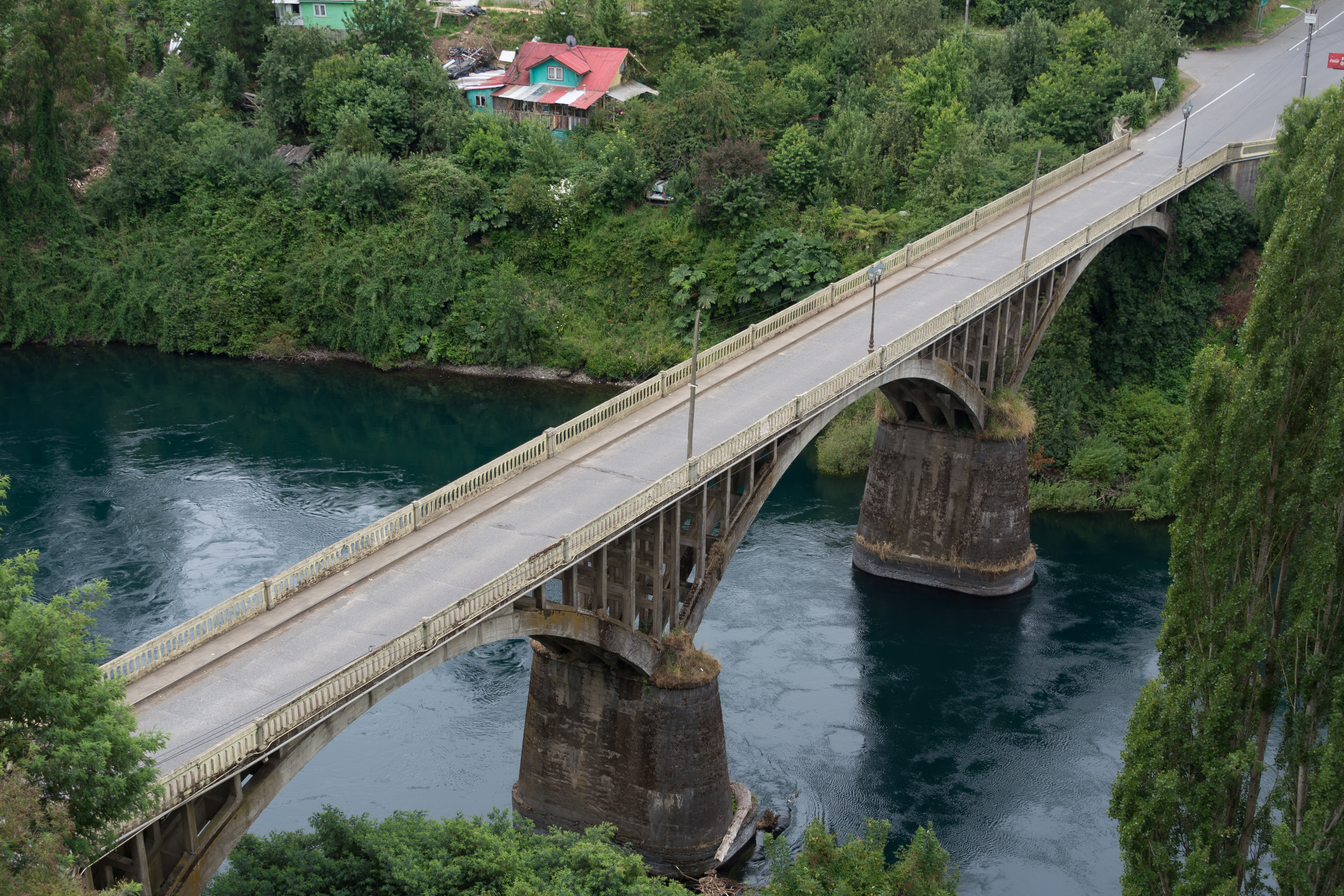 Puente Carlos Ibáñez del Campo, Río Bueno, Región de Los Ríos, Chile.